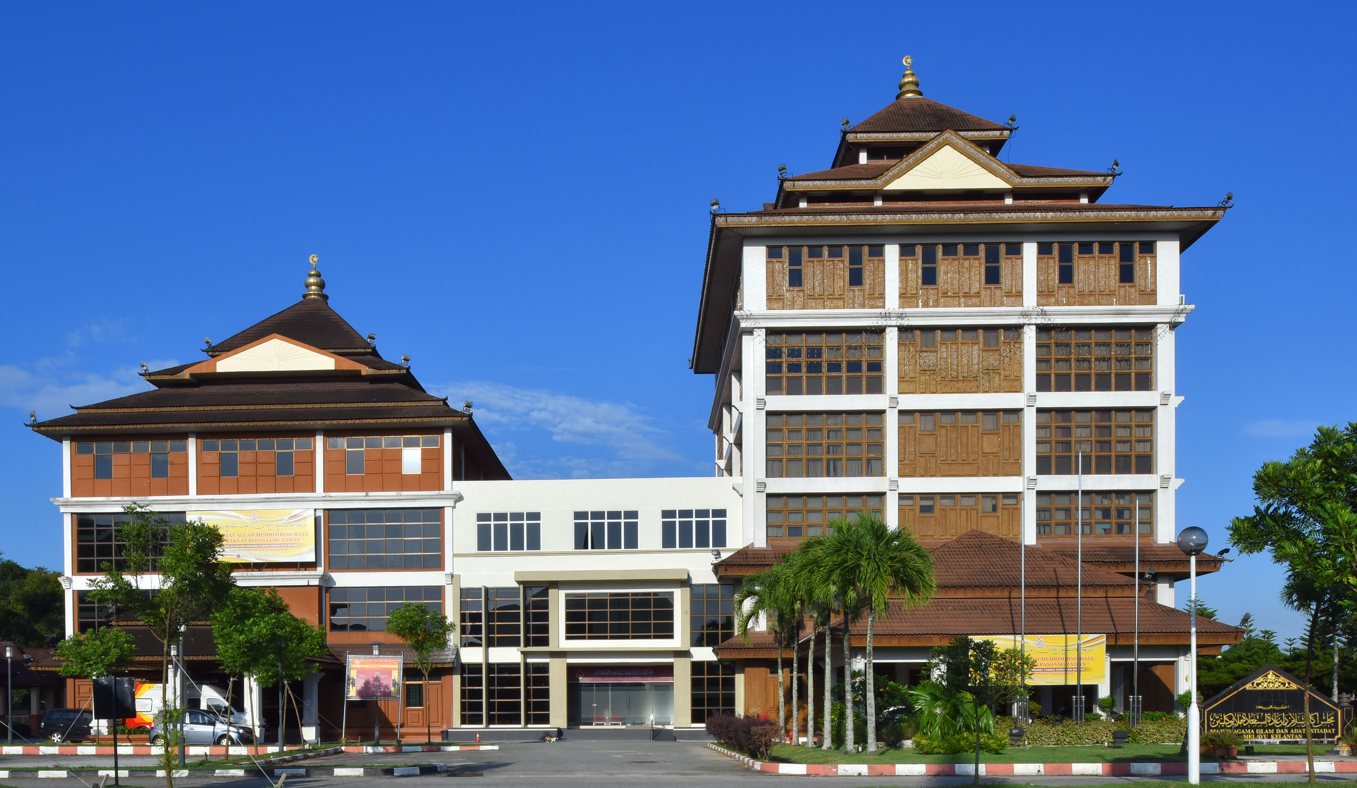 Bangunan Pejabat Majlis Agama Islam dan Adat Istiadat Melayu Kelantan di Kompleks Islam Darul Naim, Lundang, Kota Bharu